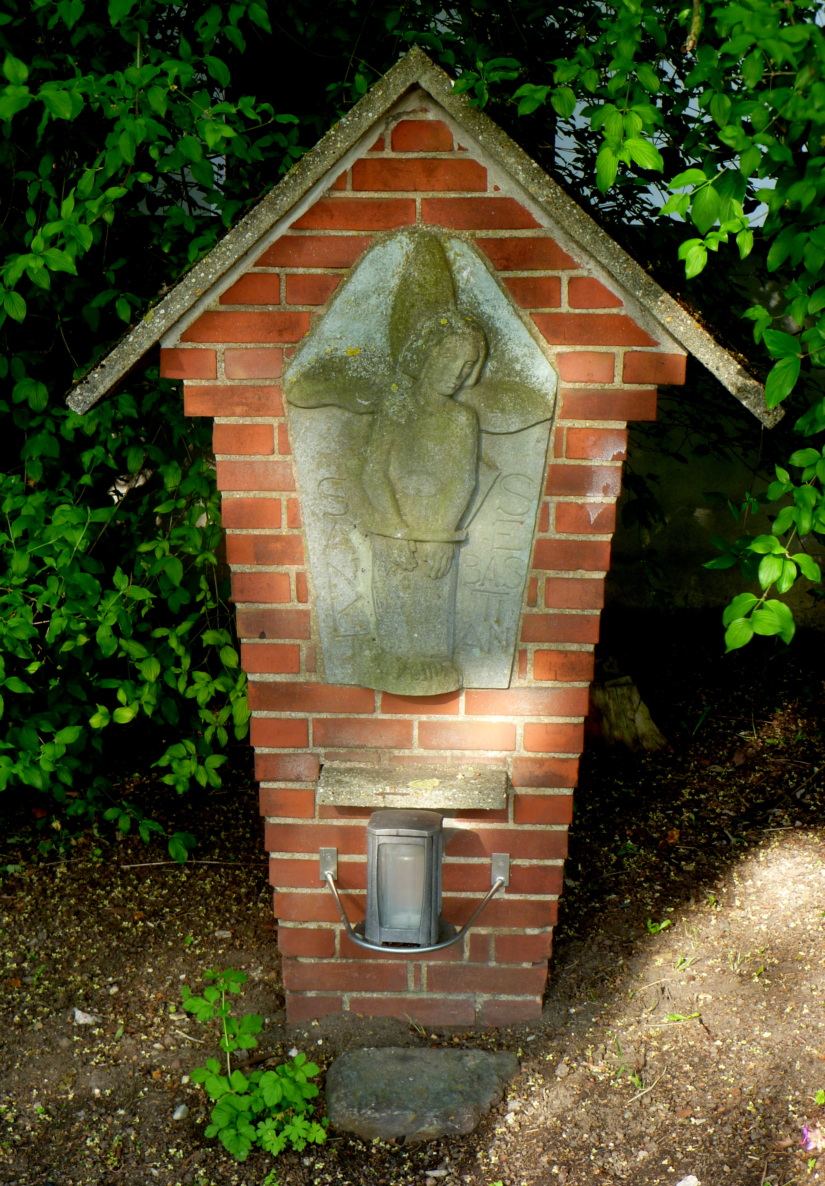 Bildstock am Hörnhang in Aachen mit der Figur des St. Sebastian, dem Pfarrpatron auf der Hörn.